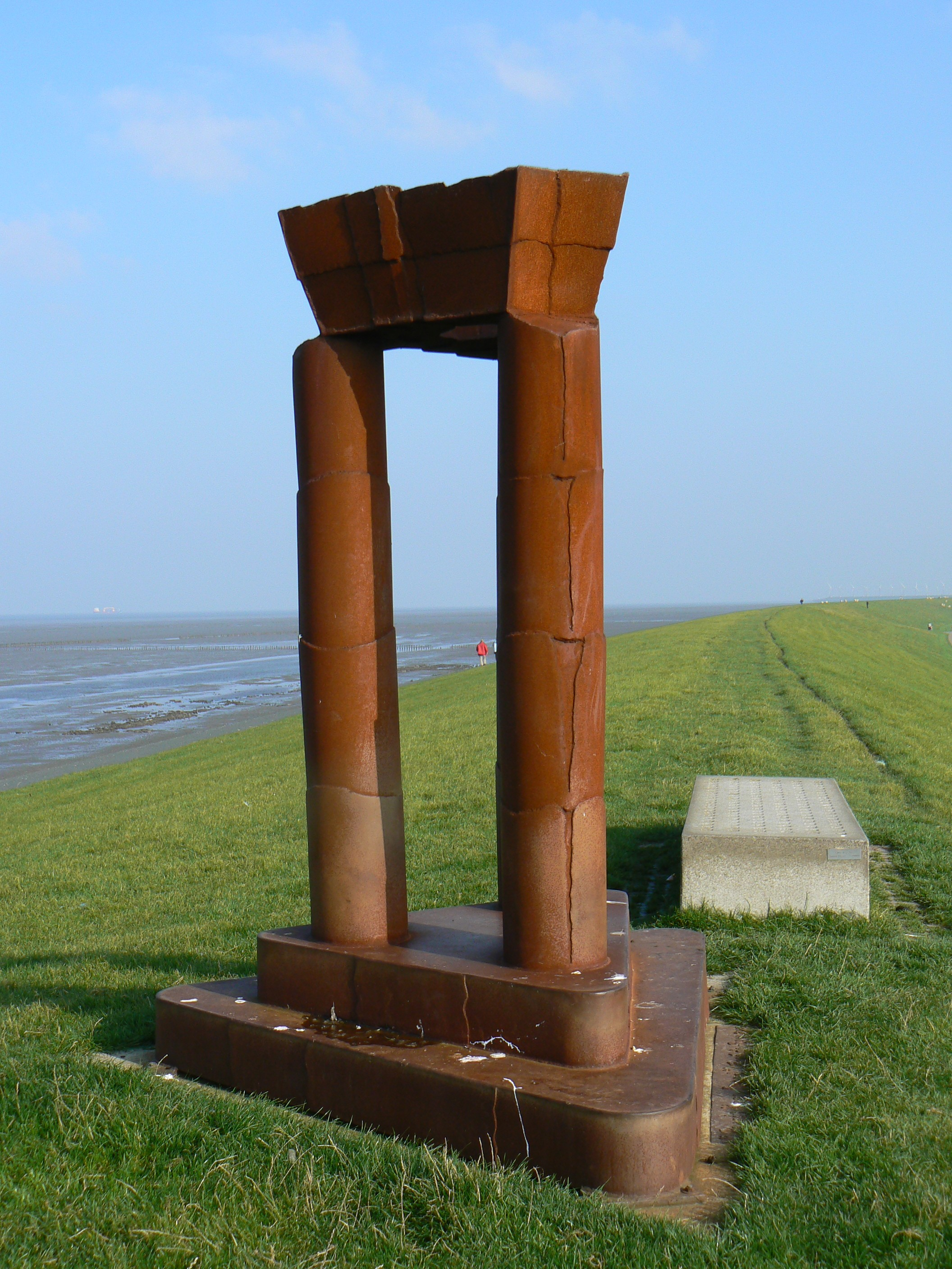 sculpture Poort Kaap Noord (2002) by R. de Boer in Uithuizermeeden/The Netherlands